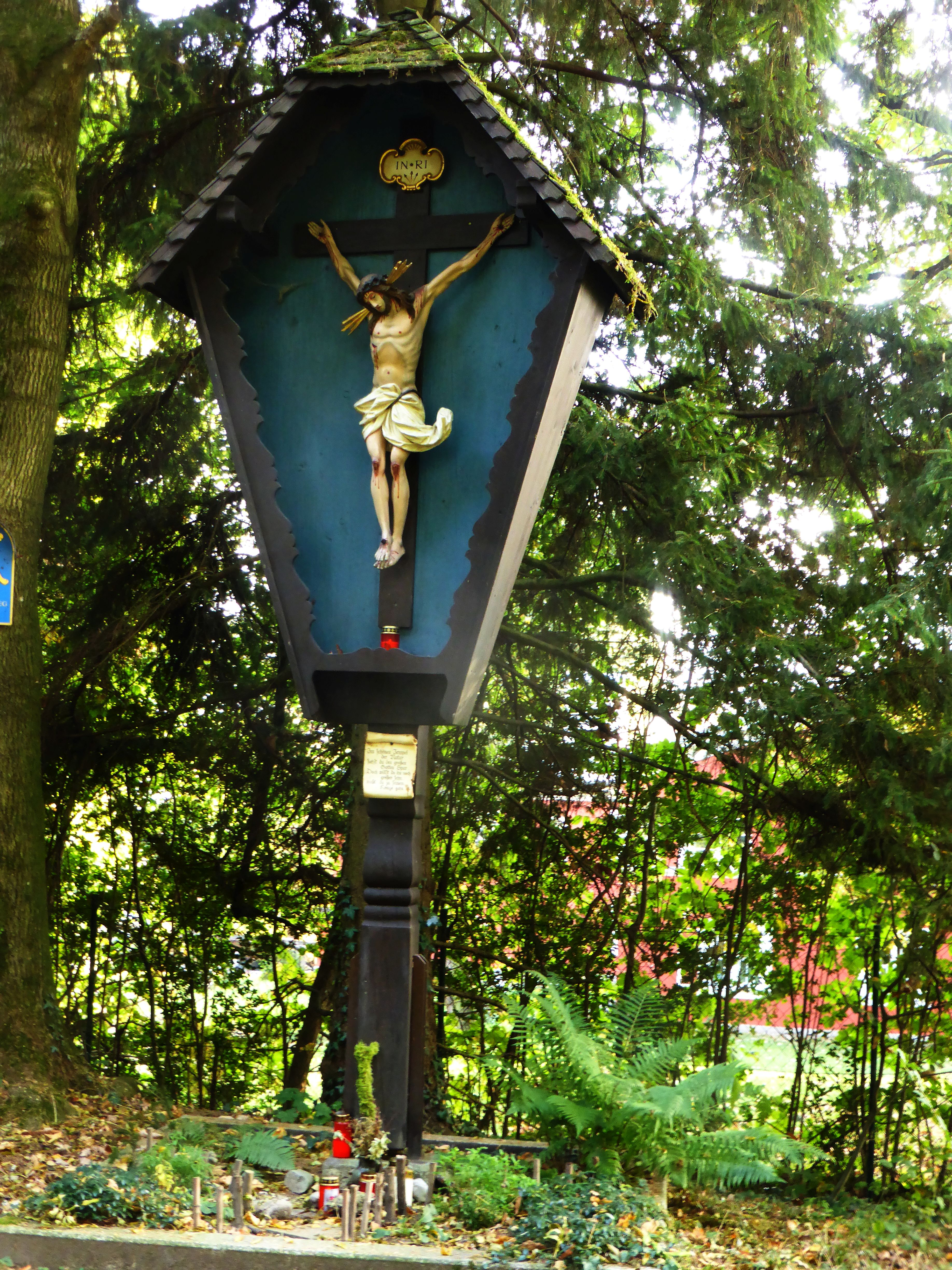 Kruzifix auf der Karolinenhöhe